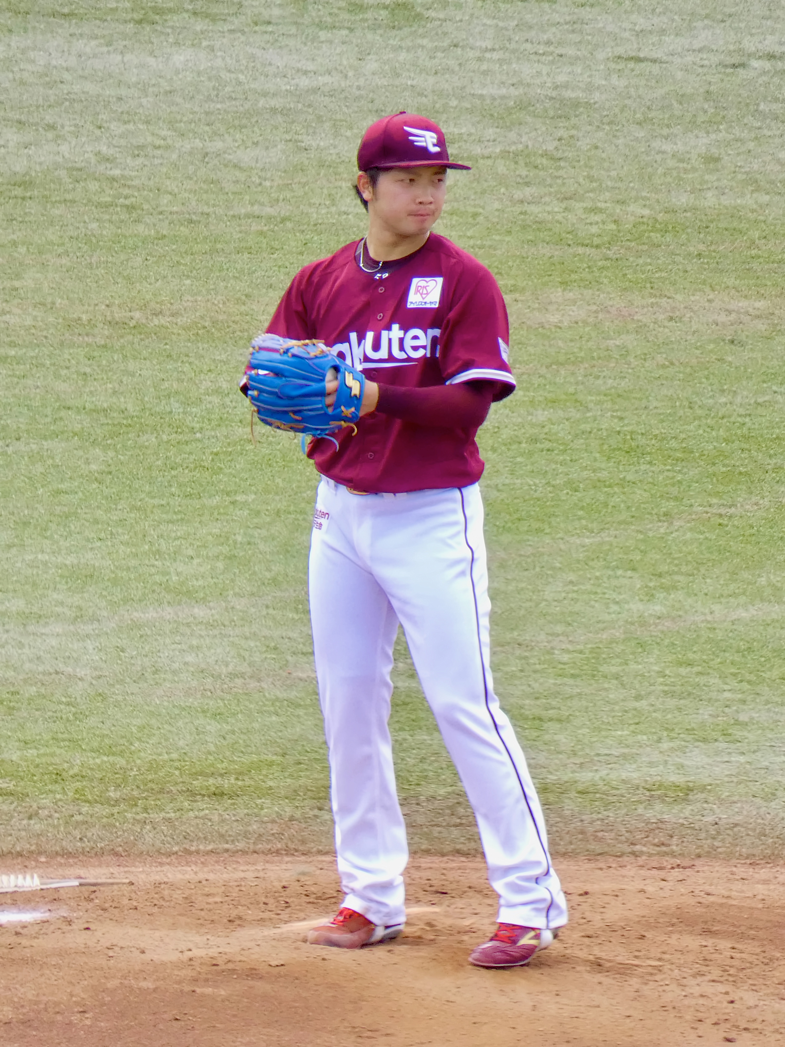 東北楽天ゴールデンイーグルスの選手「髙田萌生」。ヤクルト戸田球場にて。